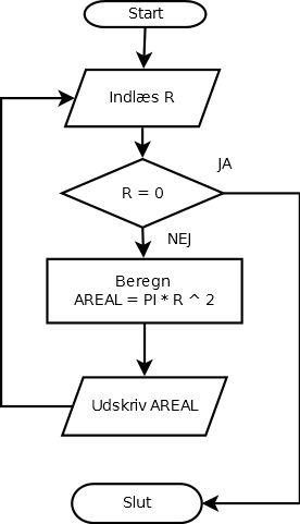 Eksempel på et flowchart, der beskriver et program til beregning af en cirkels areal.